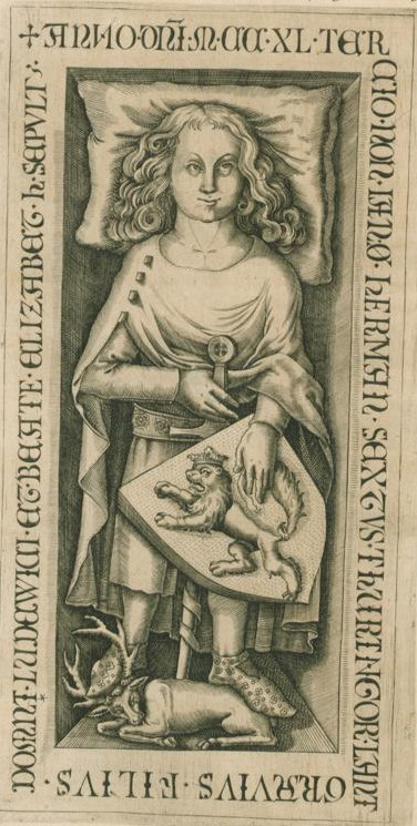 Hermann II of Thuringia